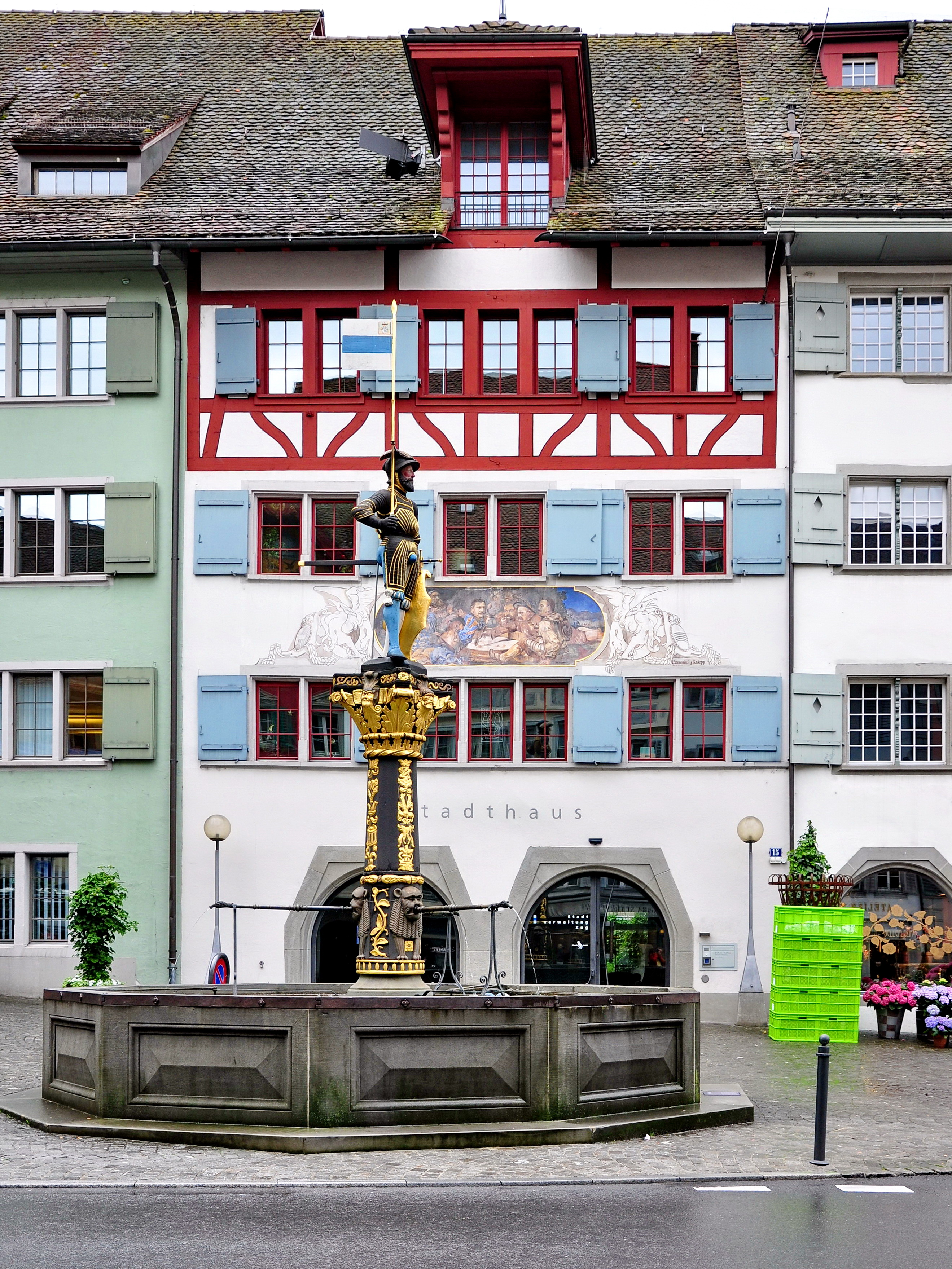 Kolingplatz in Zug (Switzerland)